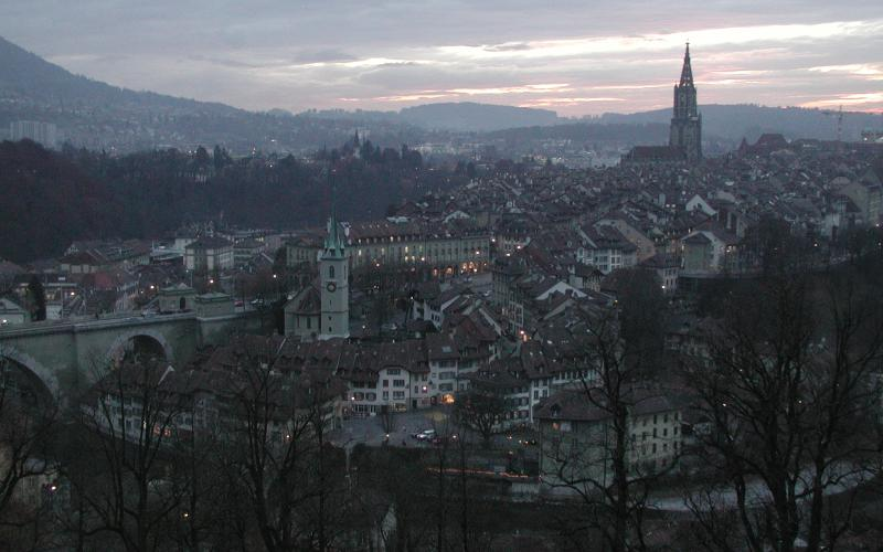 Vedere a peninsulei orașului Berna, seara. Se distinge în față râul Aare, la stângă podul Nydegg, în spatele lui o parte din muntele Gurten, și catedrala (clădirea mare din dreapta).